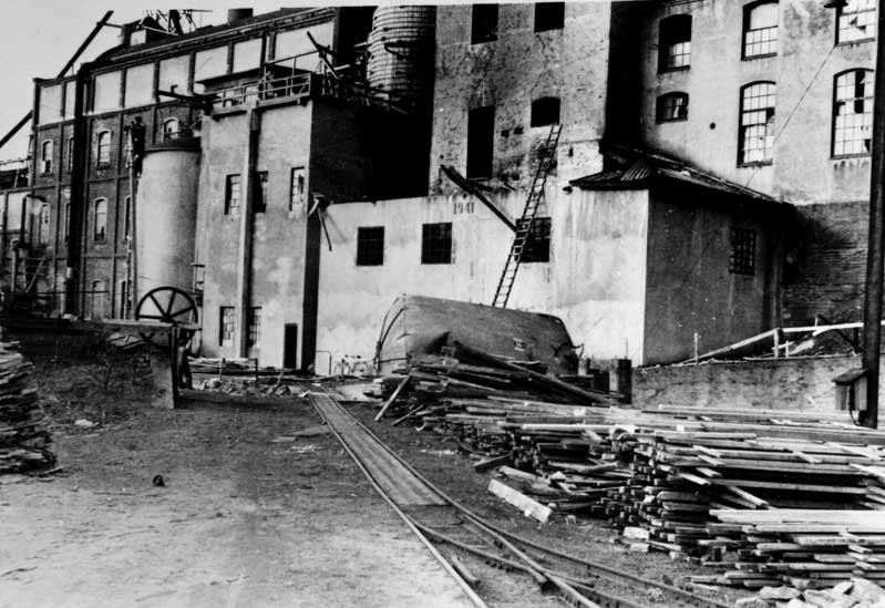 Sabotasjeaksjon på Tofte Cellulosefabrikk 1945